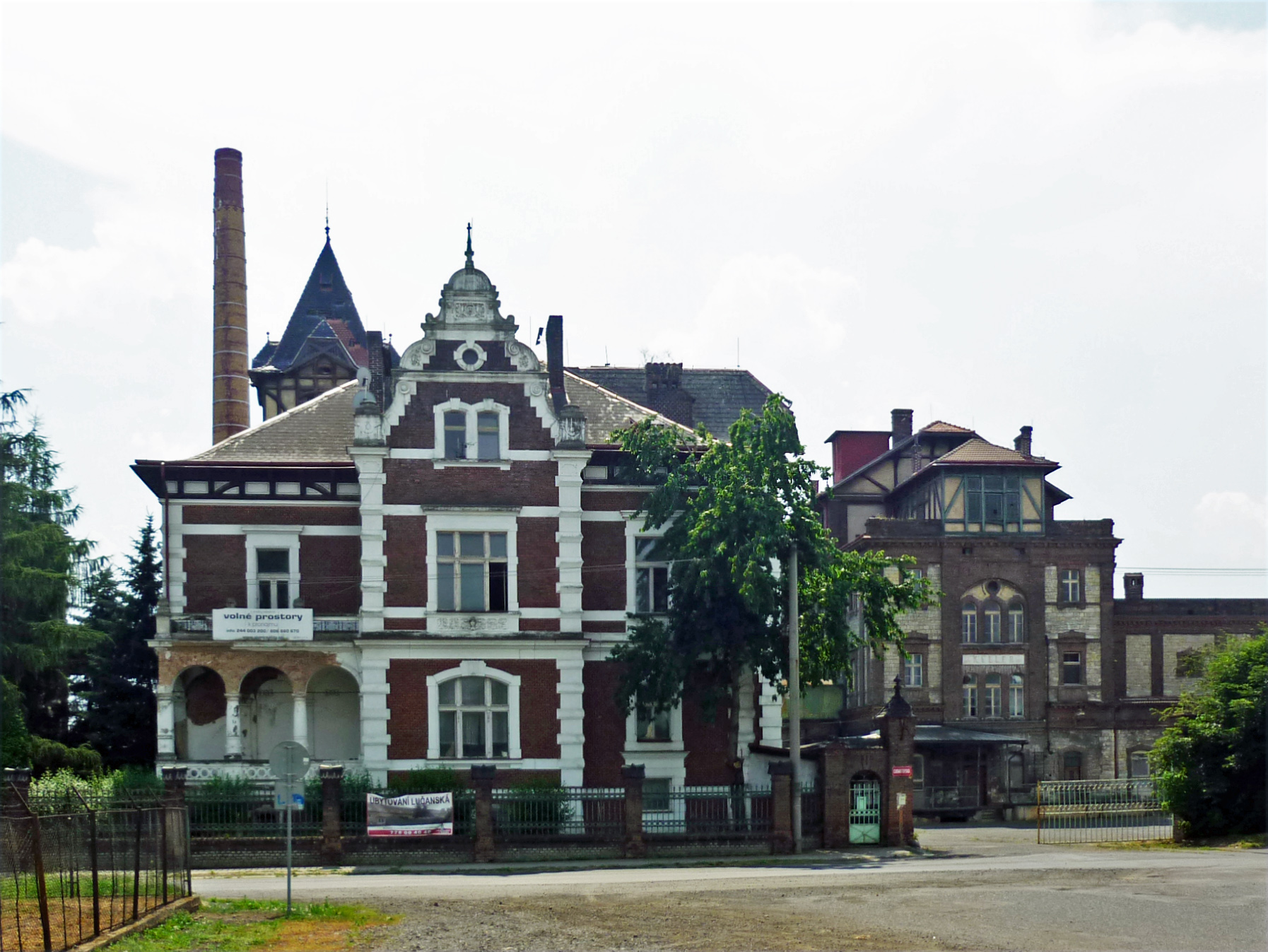 Ehem. Export-Brauerei Anton Dreher in Saaz (Žatec)